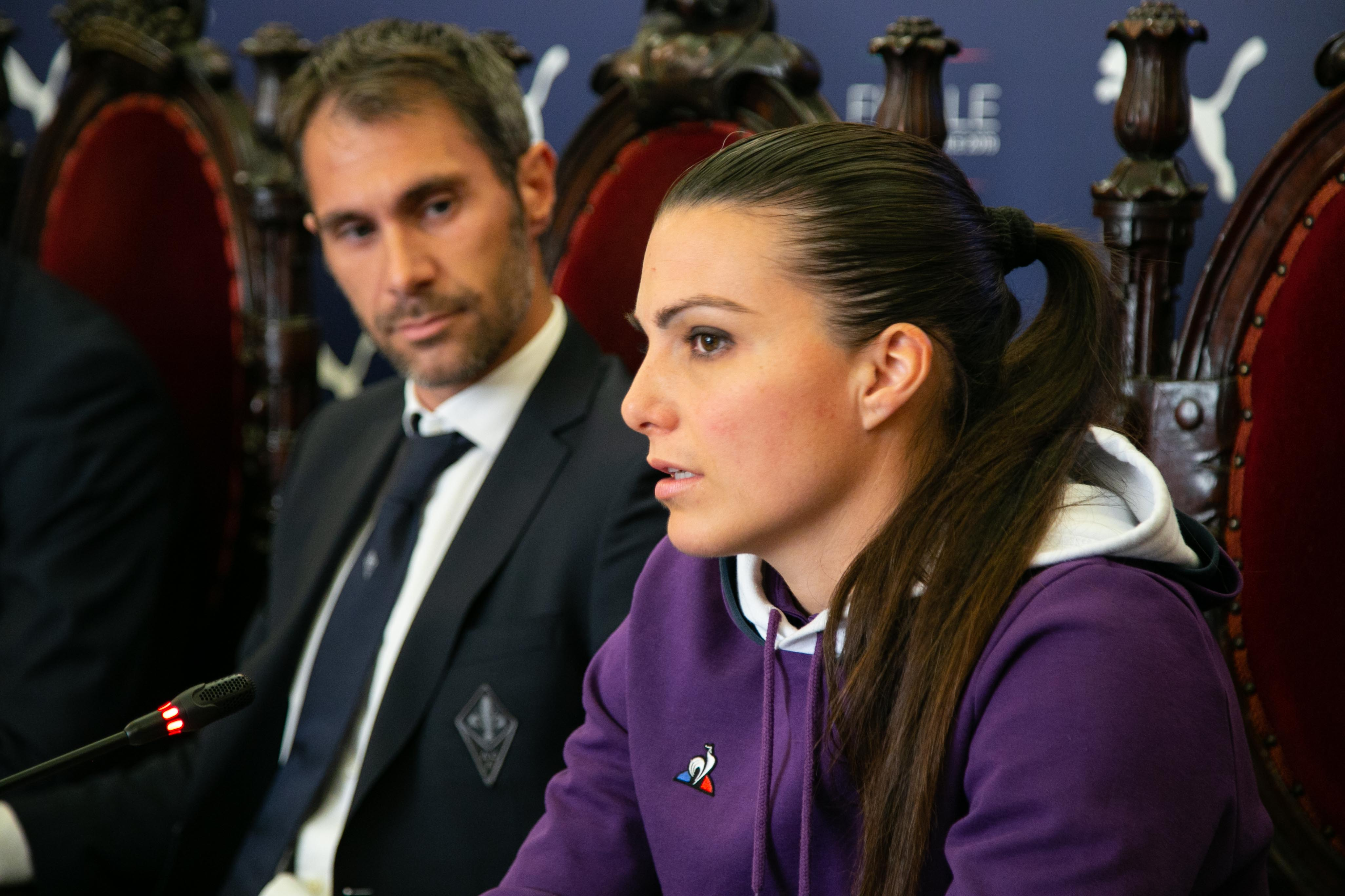 2019 04 18 Bosi cs Finale Coppa Italia Femminile-15